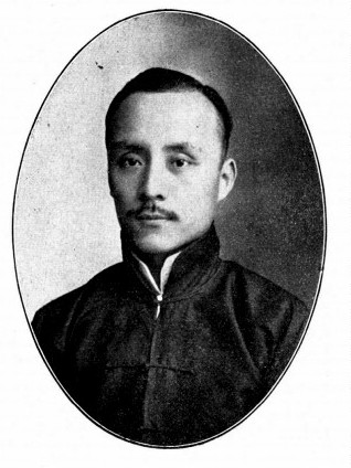 中文（台灣）: 國會議員肖像